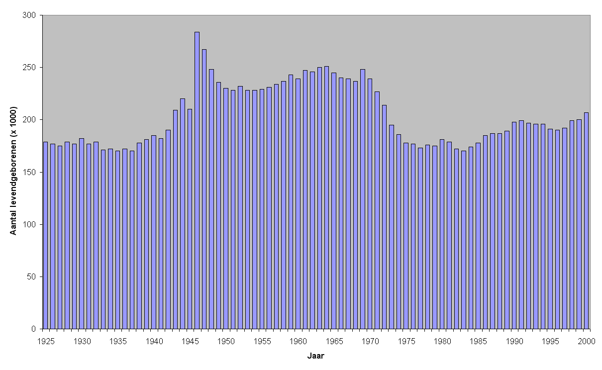 zelfgemaakte grafiek obv CBS gegevens